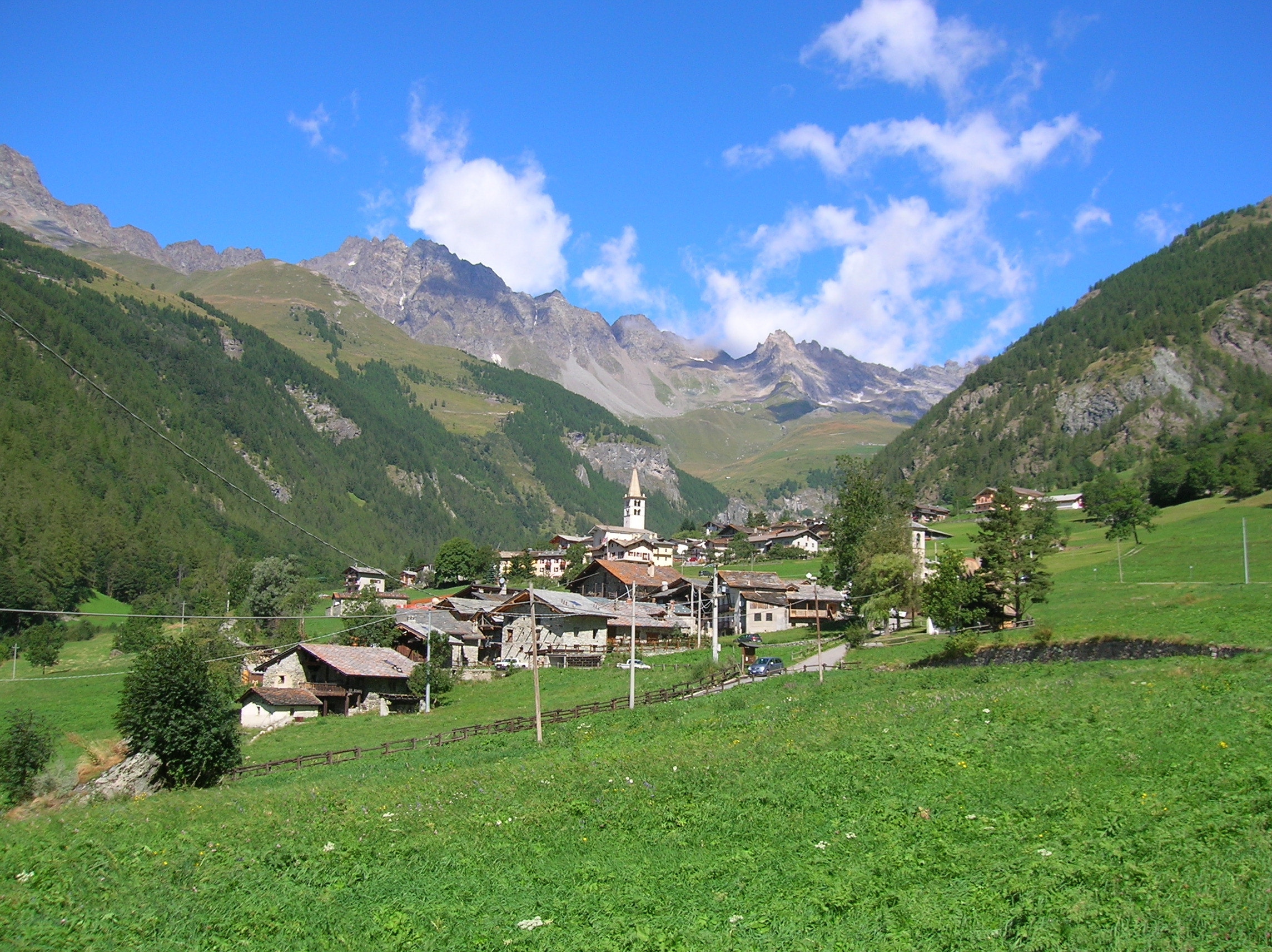 Panorama di Ollomont, Valle d'Aosta, Italia.